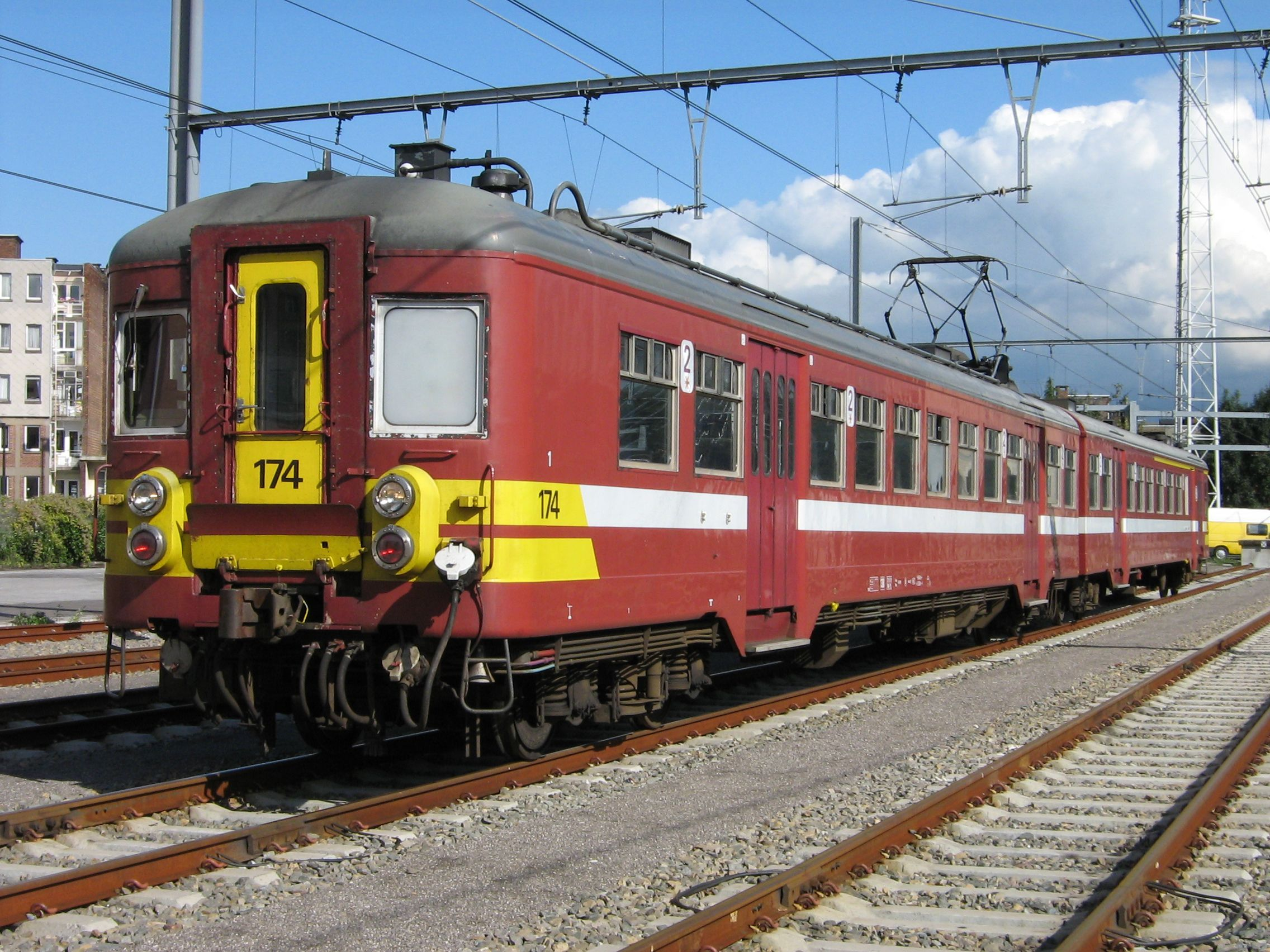 Automotrice n°174 de la SNCB dans le faisceau de Liège-Guillemins.